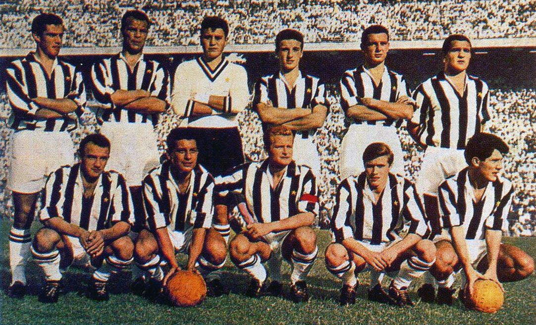 Milano (Italia), stadio San Siro, 13 settembre 1959. La formazione della Juventus F.C. scesa in campo nella vittoriosa finale di Coppa Italia 1958-59 contro il F.C. Internazionale (4-1); la partita, seppur appartenente alla stagione sportiva 1958-59, venne disputata nel settembre 1959 vedendo pertanto in campo la rosa dell'annata 1959-60. Da sinistra, in piedi: B. Nicolè, J. Charles, C. Mattrel, E. Castano, U. Colombo, F. Emoli; accosciati: S. Cervato, G. Stivanello, G. Boniperti (capitano), B. Sarti, O. Sívori.